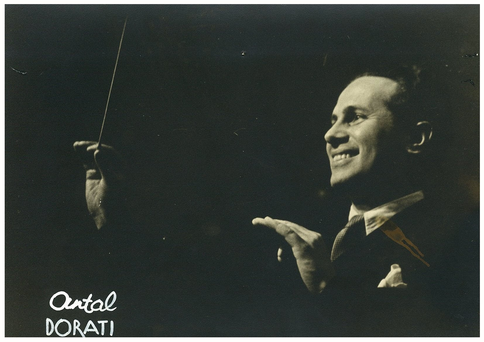 Antal Dorati, compositor húngaro.